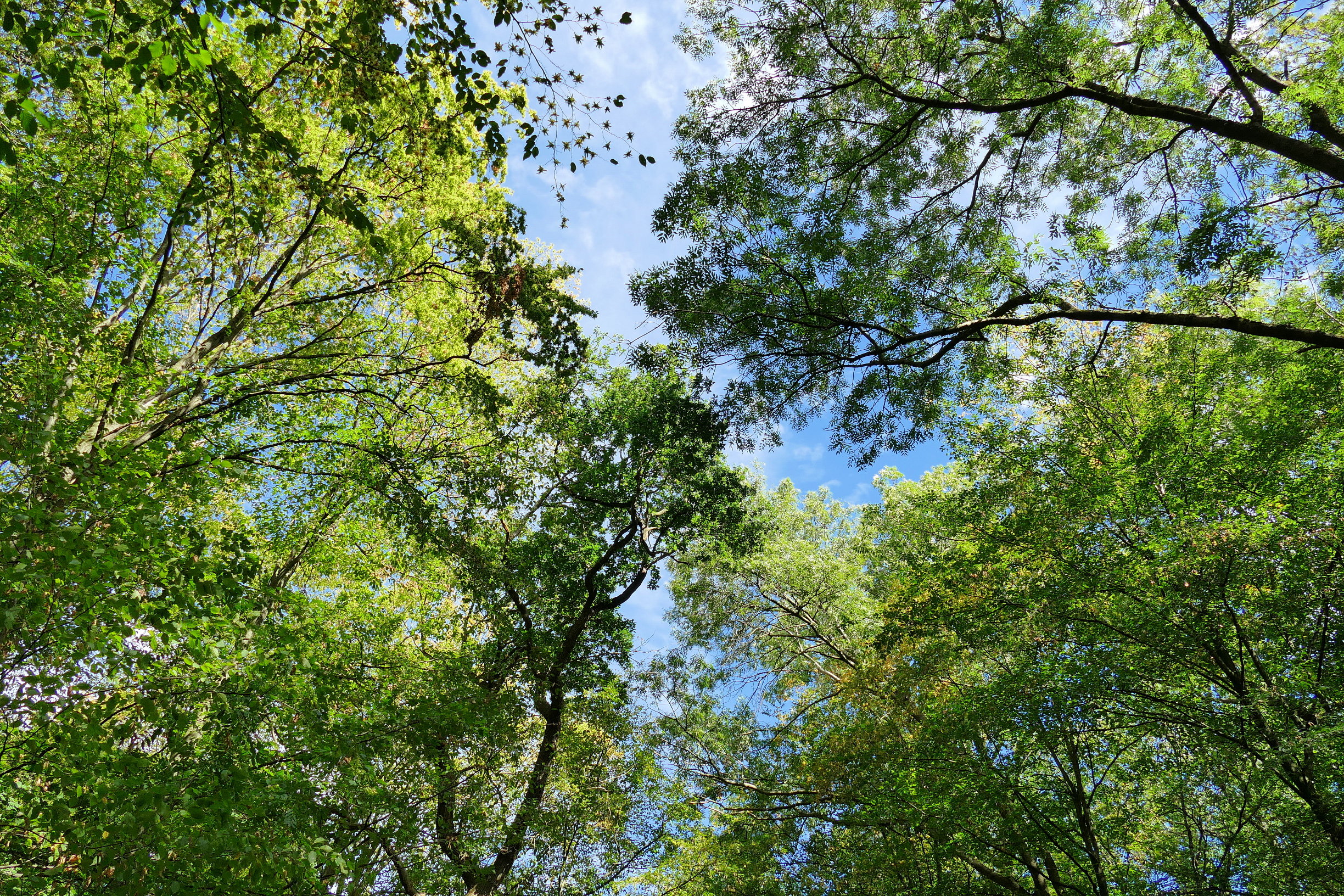 Blätterdach der Baumkronen im Hambacher Forst bei Morschenich. Beginnender Herbst mit Laub verschiedener Baumarten im September 2018.